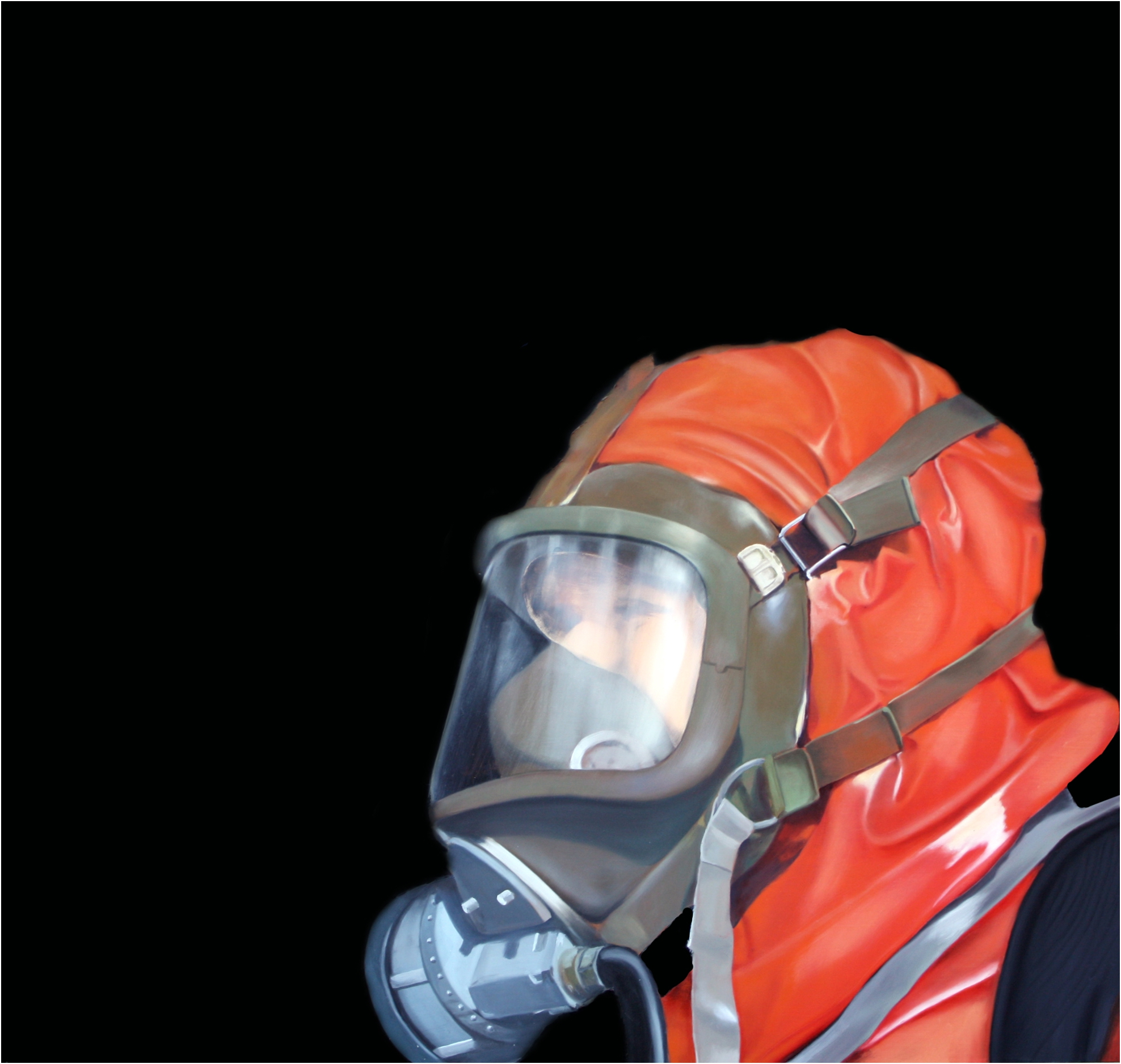 Pintura SCBA